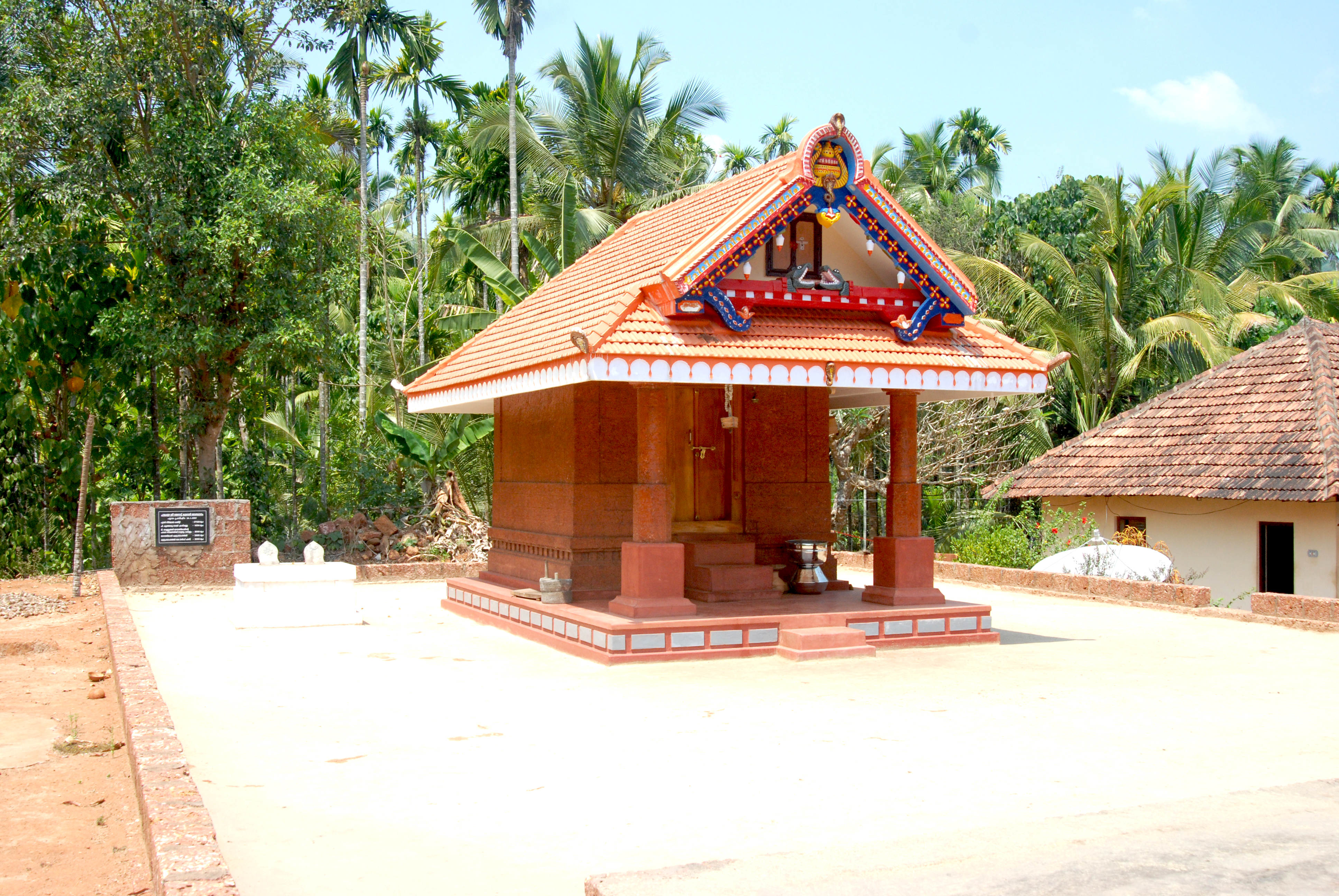 വടക്കേ മലബാറിൽ‌ തീയ്യത്തറവാടിനോടു ചേർ‌ന്നു കാണപ്പെടുന്ന വയനാട്ടുകുലവന്റെ താനം‌